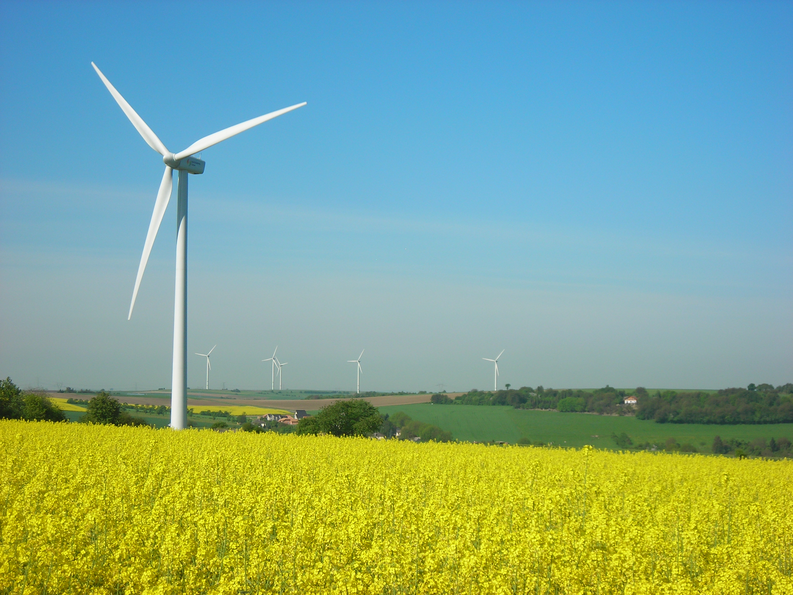 Niedervisse